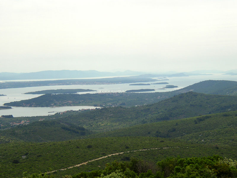 Pašman: pogled s Bokolja